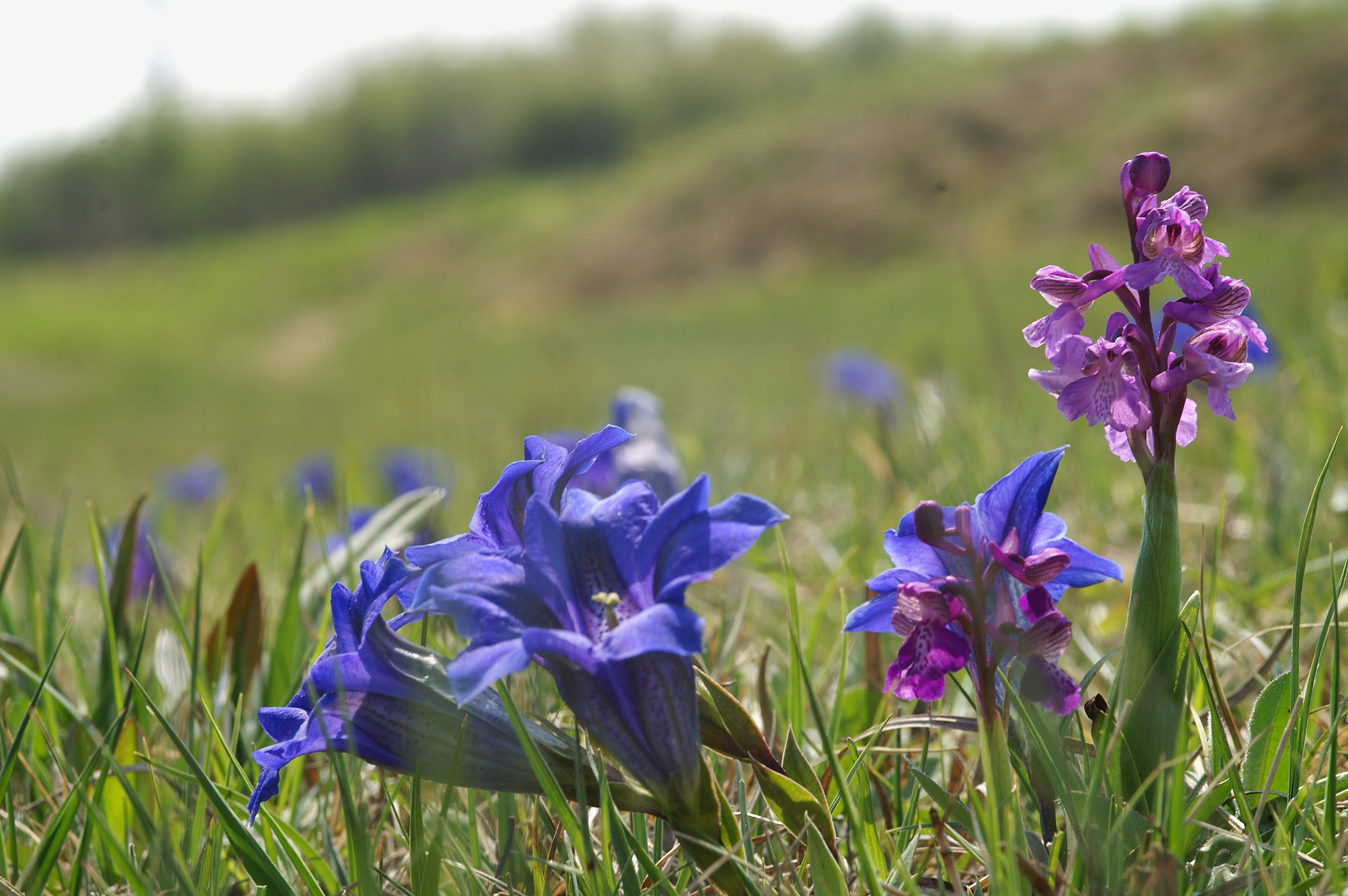 Stängelloser Enzian (Gentiana clusii) und Kleines Knabenkraut (Orchis morio) auf Magerrasen, Lechtalheiden bei Augsburg